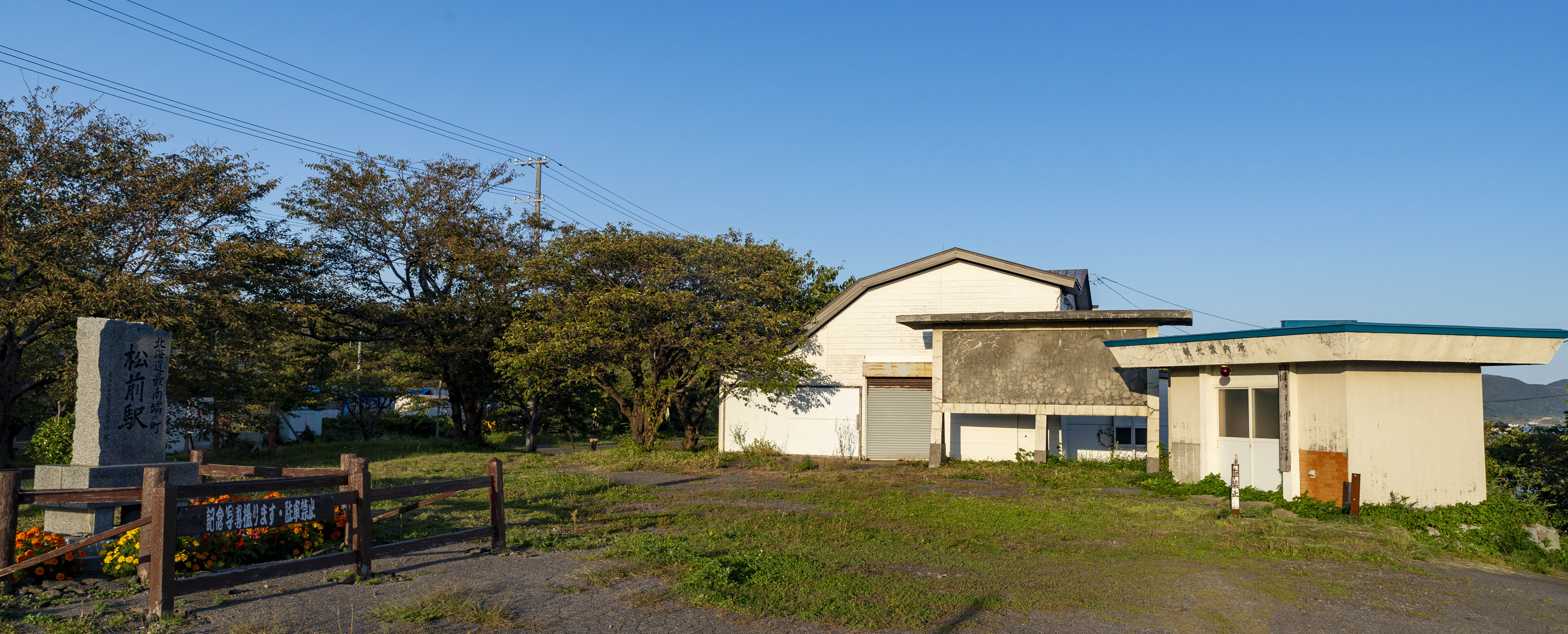 北海道旅客鉄道株式会社松前線松前駅跡地